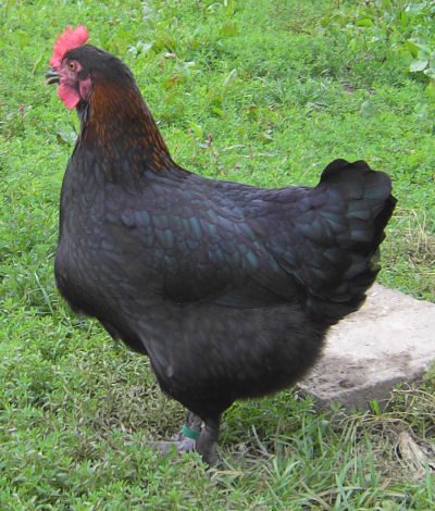 Poule Marans NC